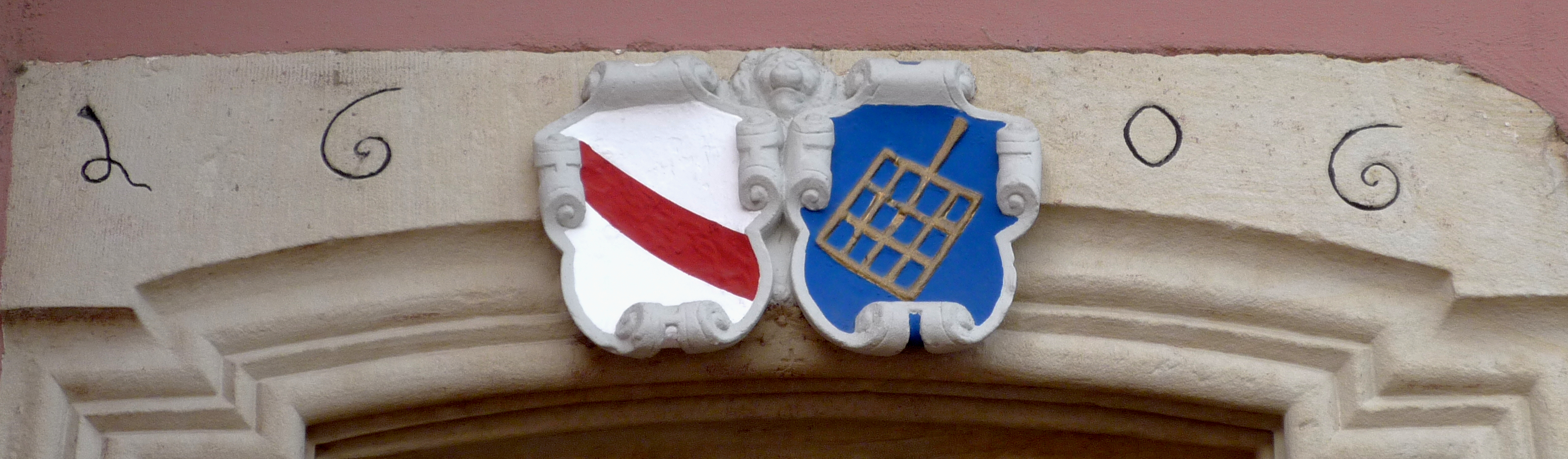 Wasselonne, linteau de porte armorié daté de 1606